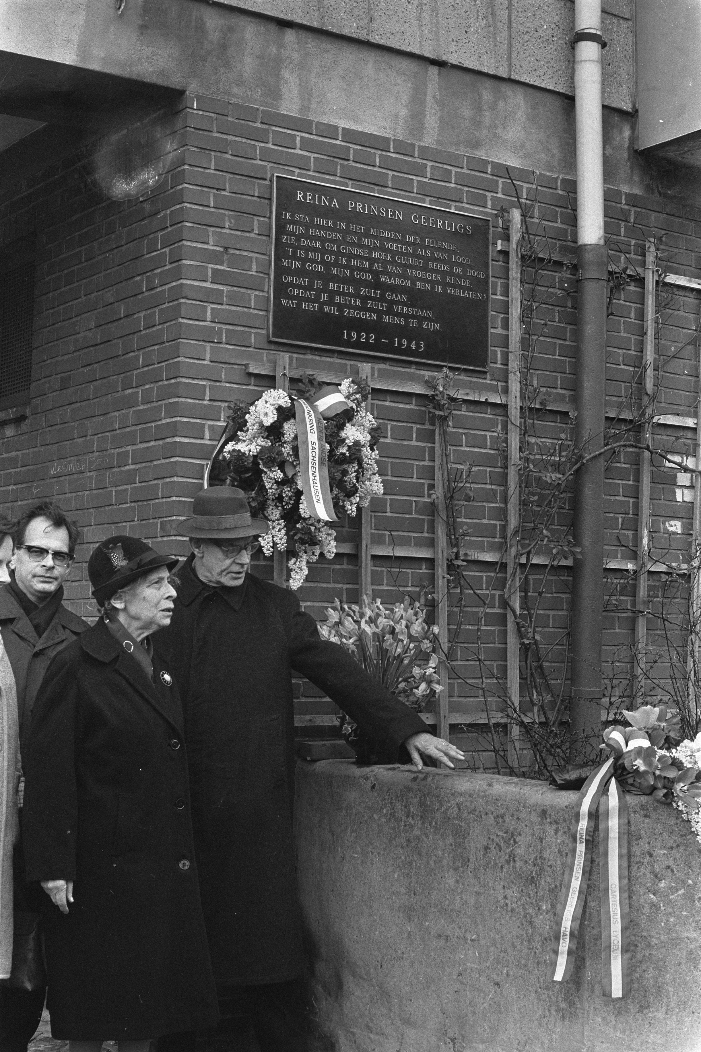 Collectie / Archief : Fotocollectie Anefo Reportage / Serie : Herdenkingsplaquette Reina Prinsen Geerligs onthuld Beschrijving : De ouders bij de plaquette ter nagedachtenis van hun dochter Reina, verzetsrijdster en schrijfster, die tijdens de Tweede Wereldoorlog omkwam in het concentratiekamp Sachsenhausen. Datum : 27 april 1970 Locatie : Amsterdam, Noord-Holland Trefwoorden : herdenkingen, placquettes, schrijvers, tweede wereldoorlog, verzetsstrijders Fotograaf : Fotograaf Onbekend / Anefo Auteursrechthebbende : Nationaal Archief Materiaalsoort : Negatief (zwart/wit) Nummer archiefinventaris : bekijk toegang 2.24.01.05 Bestanddeelnummer : 923-4750 Reacties Geplaatst door Maaike op 23 februari 2014 - 19:23. Locatie: Reina Prinsen Geerligsstraat (Slotermeer) NB. Gedenkplaat / Herdenkingsplaquette ontworpen door beeldhouwer C.B.M. Otten